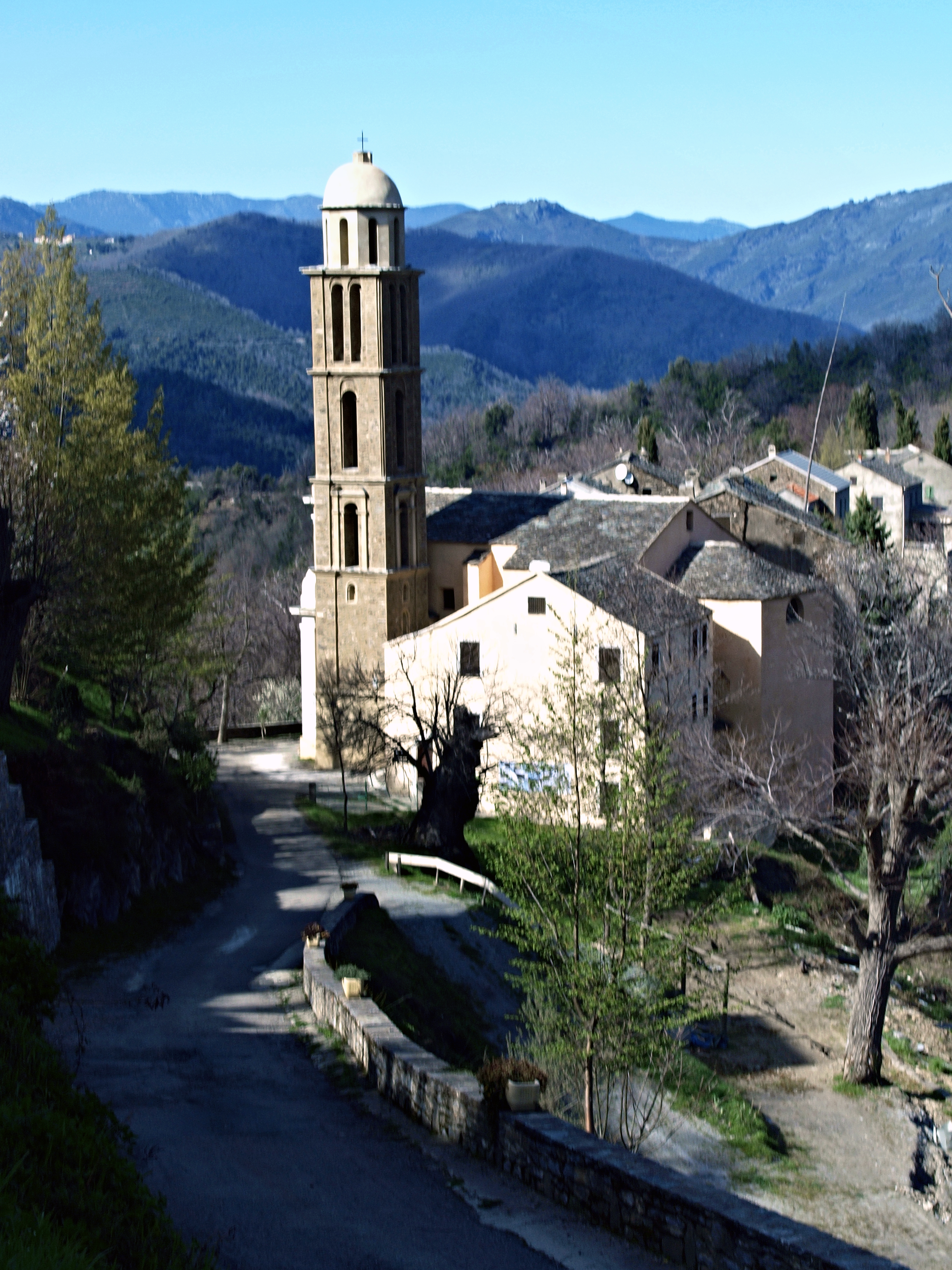 Carpineto, Castagniccia (Corse) - Église paroissiale de l'Immaculée Conception